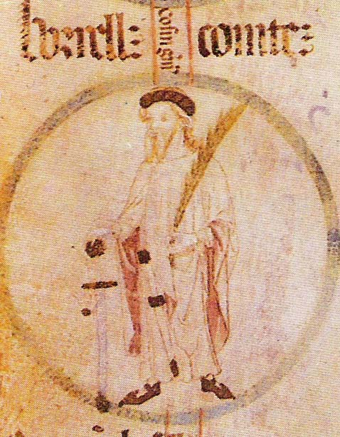 Rotlle genealògic del Monestir de Poblet